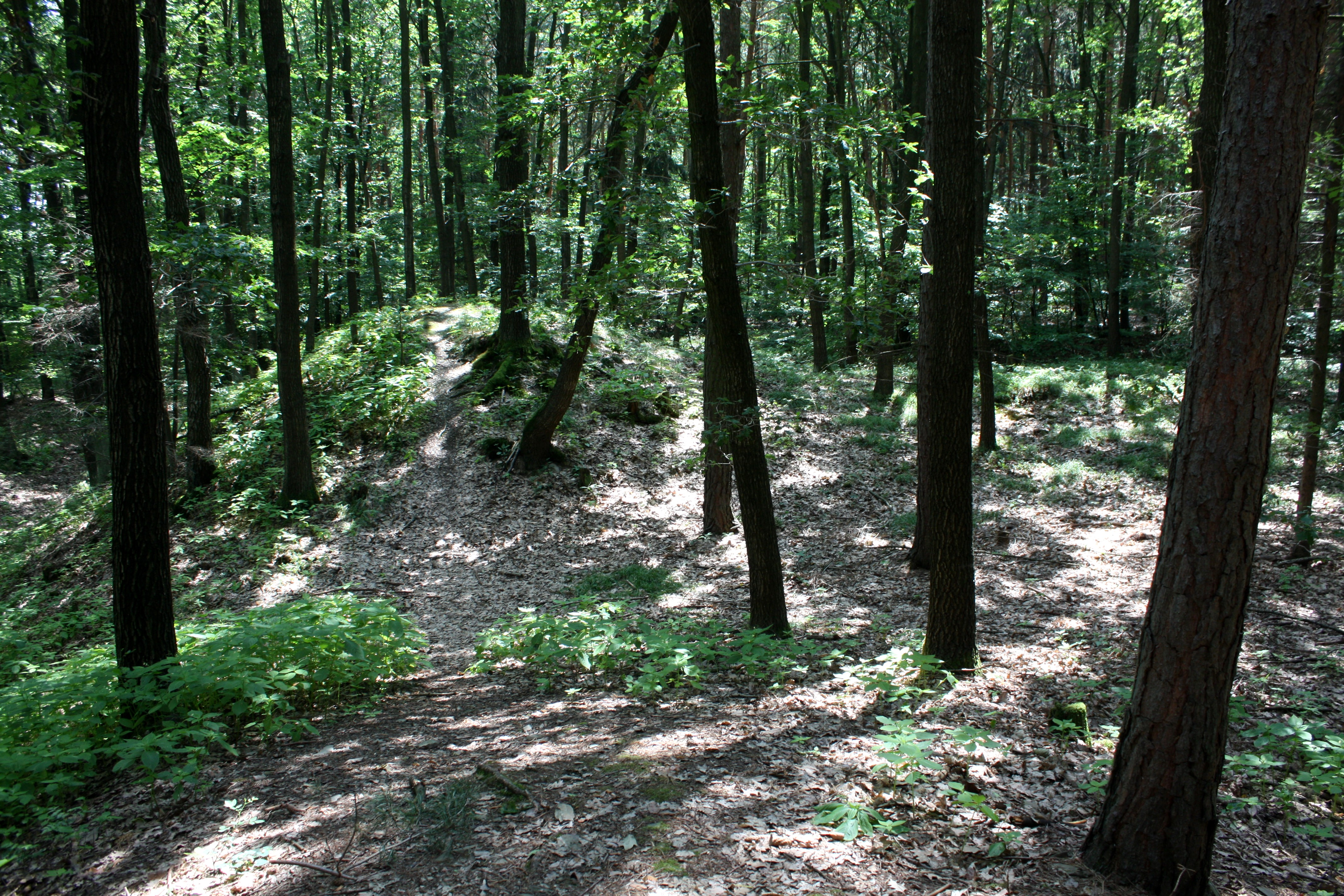 Vchod ve východní části valu viereckschanze u Ludéřova na Olomoucku